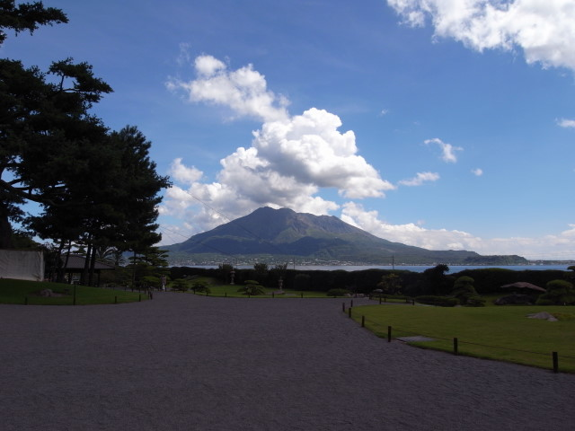 Senganen(仙巌園), Japan